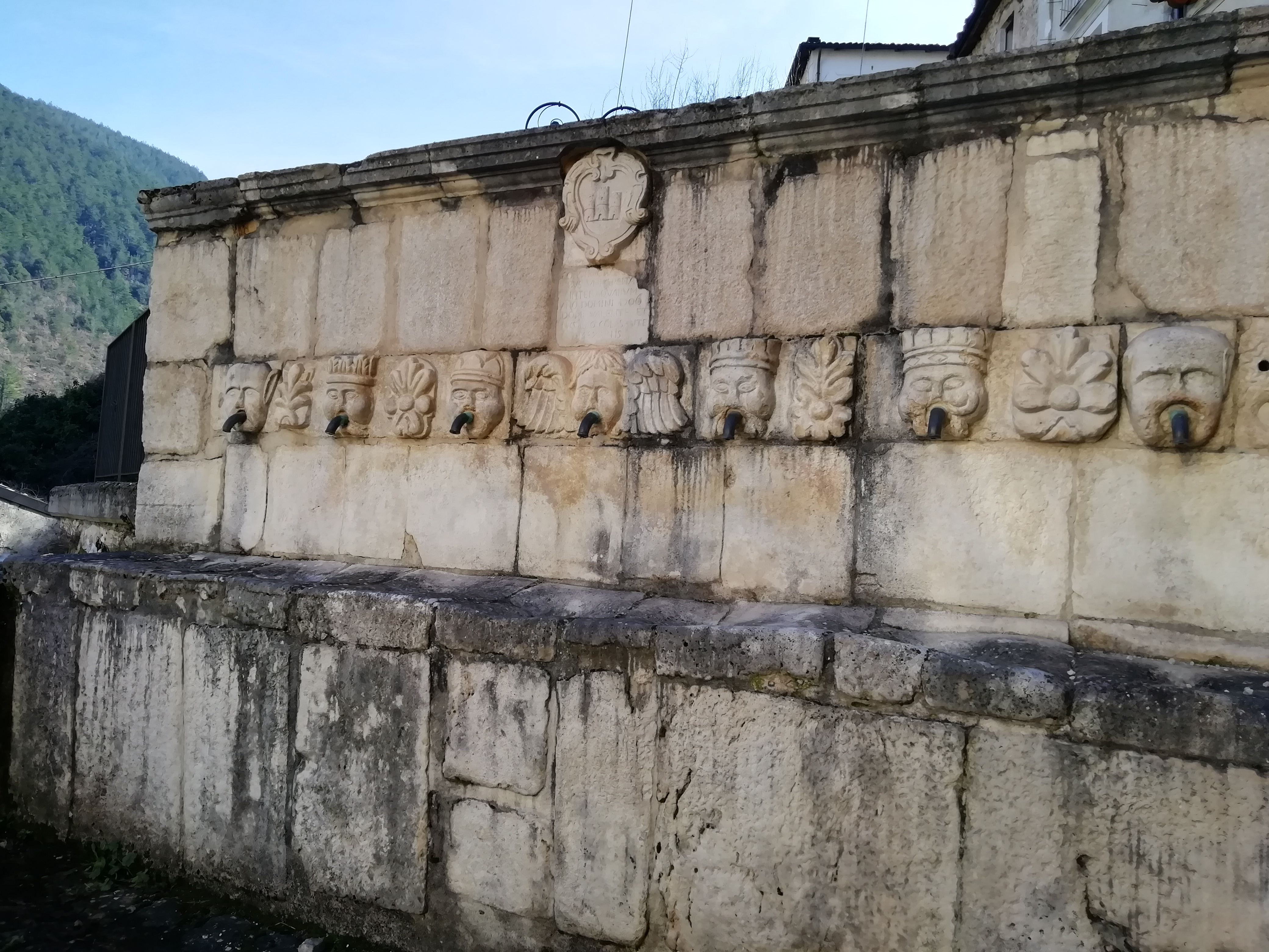 Fù l'unica fonte d'acqua vicina al paese per molto tempo.